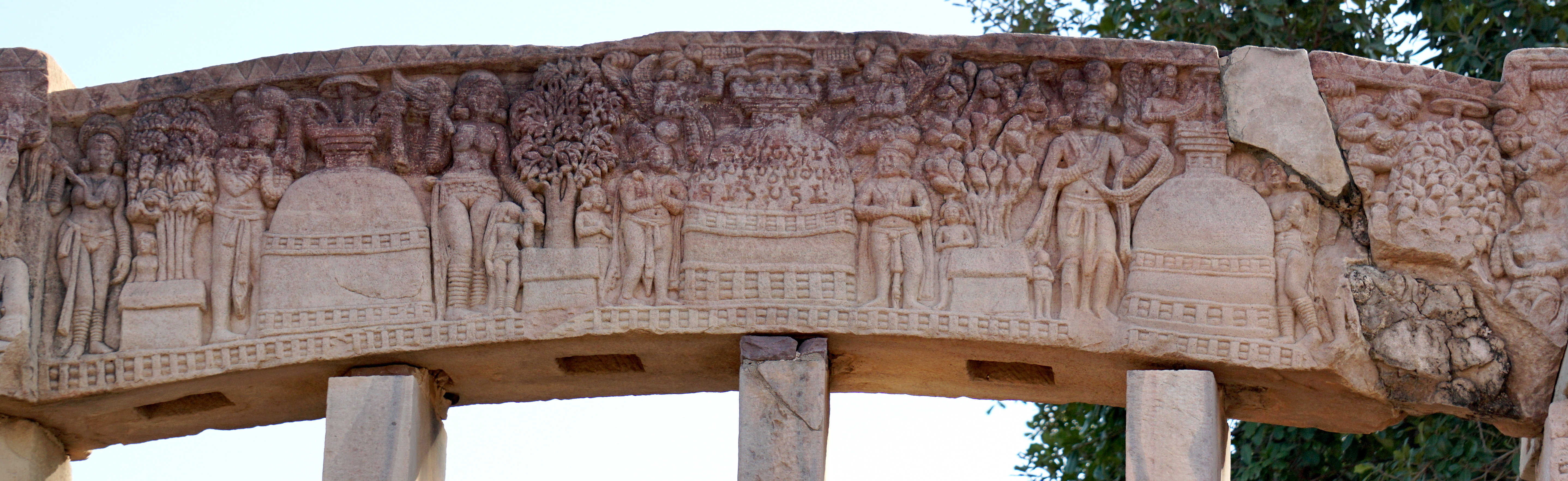 Sanchi Stupas, Vidisha, India